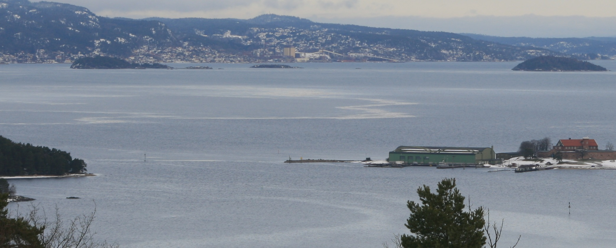 Vealøsrenna, sett fra utkikkstårnet i Festningen